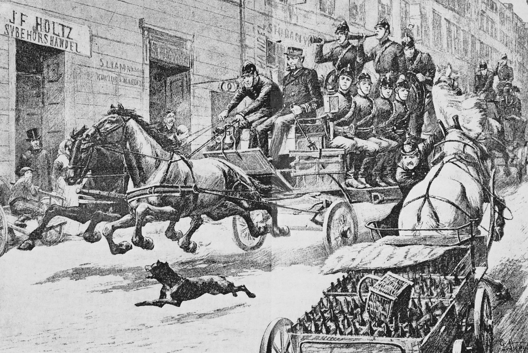 Stockholms brandförsvar rycker ut på Stora Nygatan med häst och vagn